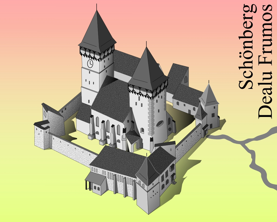 Biserica fortificata din Dealu Frumos